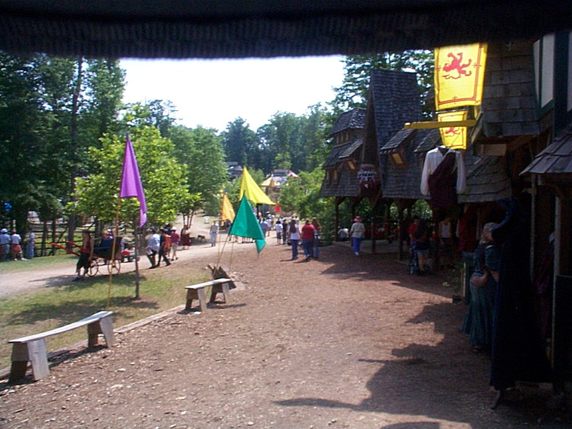 DCP02096